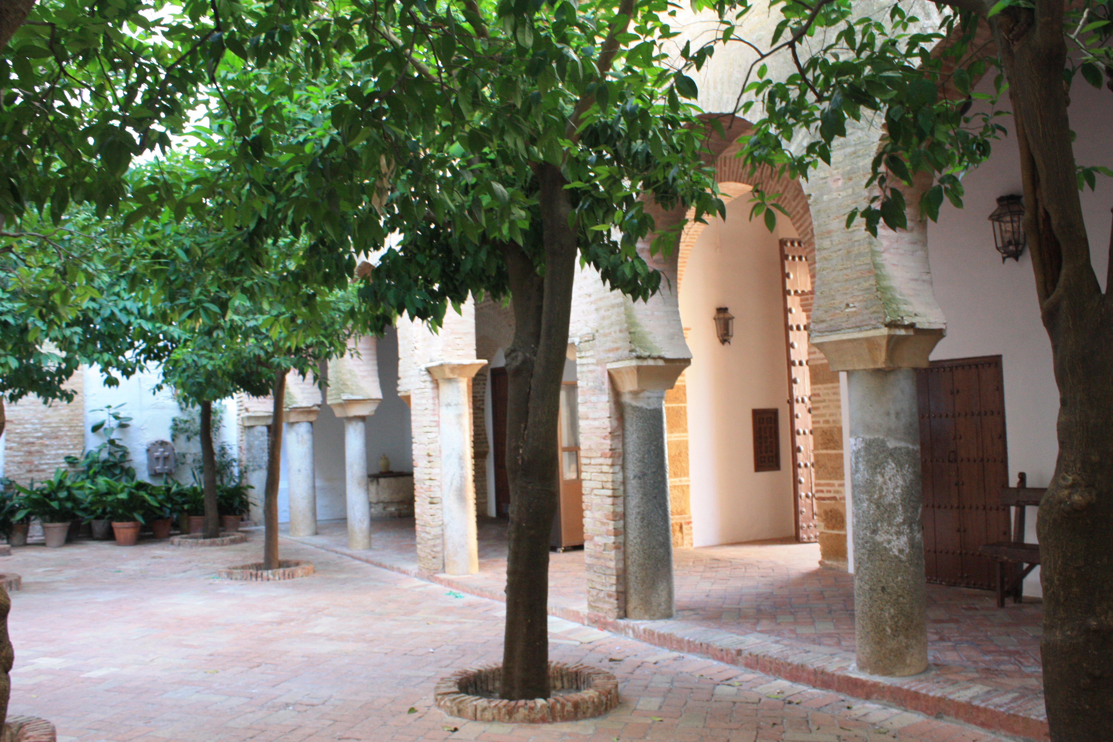 Tower de la Huerta Martín Pérez (almoade Time)